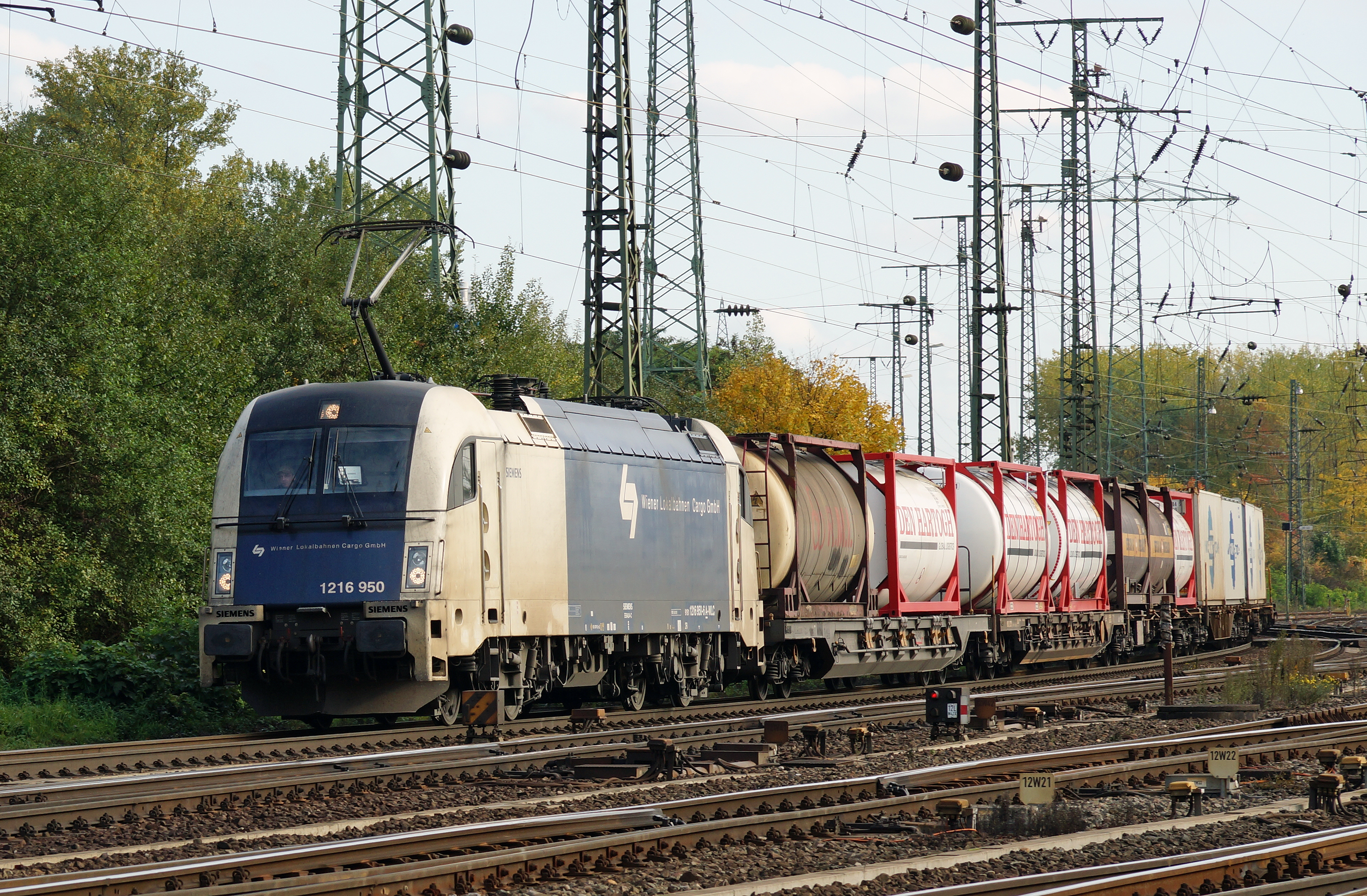 Wiener Lokalbahnen Siemens ES 64 U 4 (1216 950) in der Nähe des Rangierbahnhof Gremberg.